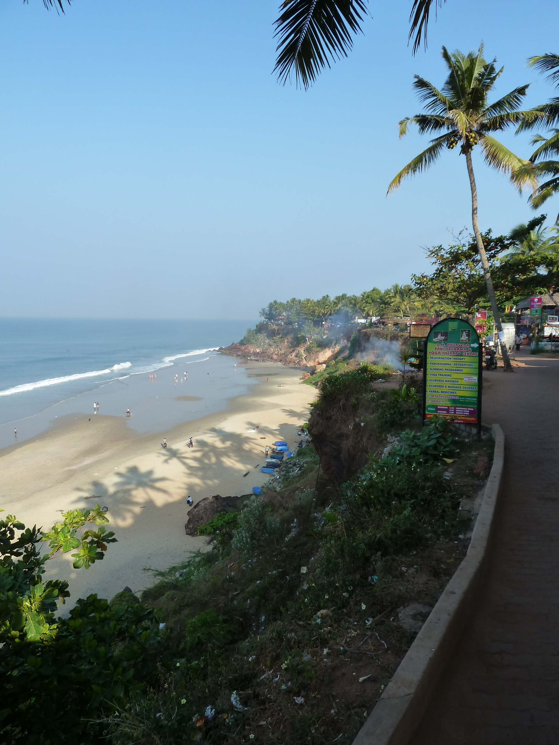 Klippen am Strand von Varkala Unknown